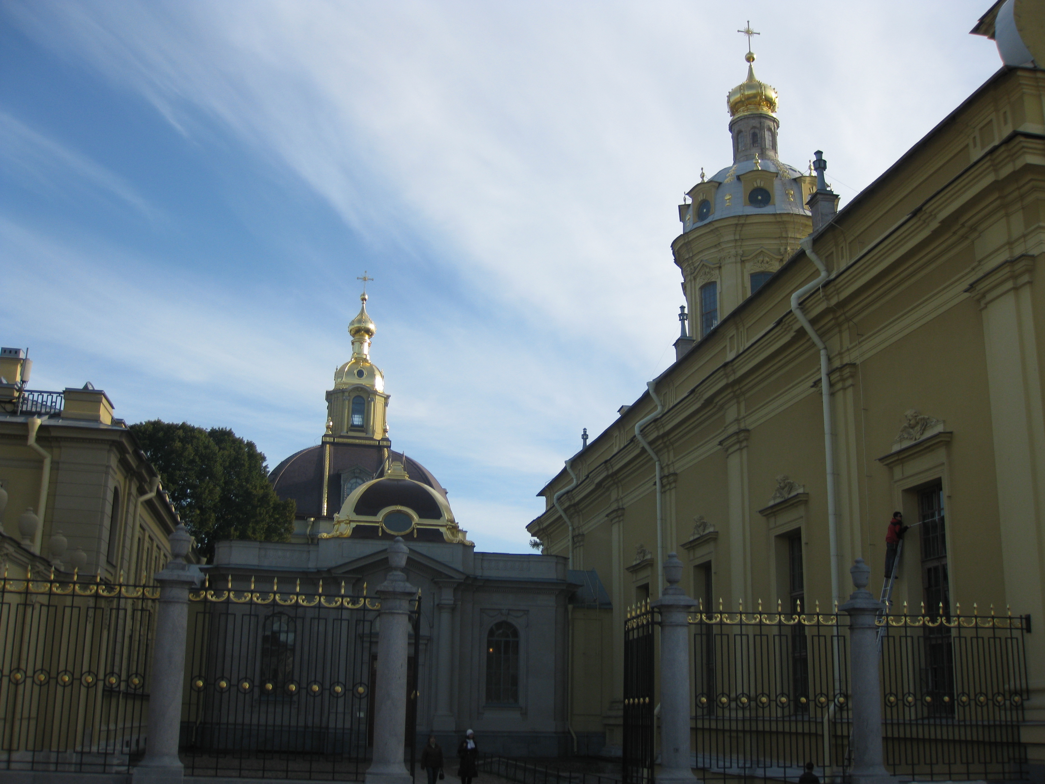 Saint Peter & Paul Cathedral קתדרלת פטרוס ופאולוס במצודת פטרוס ופאולוס סנקט פטרבורג בקתדרלה קבורים כל הצארים (למעט אחד) מאז פיוטר הגדול.